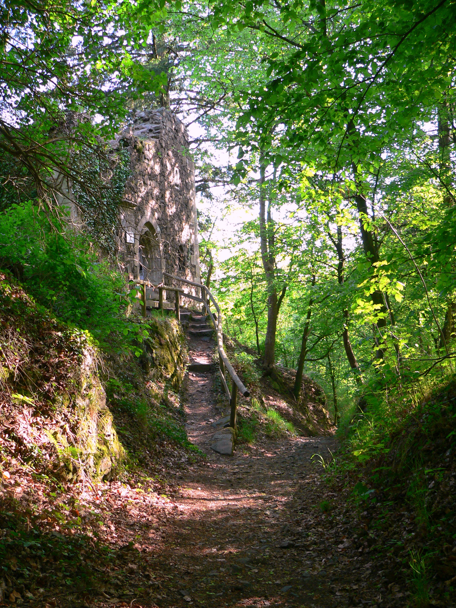 Ansicht der Ruine der Marienkapelle in Bad Berneck. Direkt darunter verläuft die (etwas verstürtzte) Altstrasse via imperii